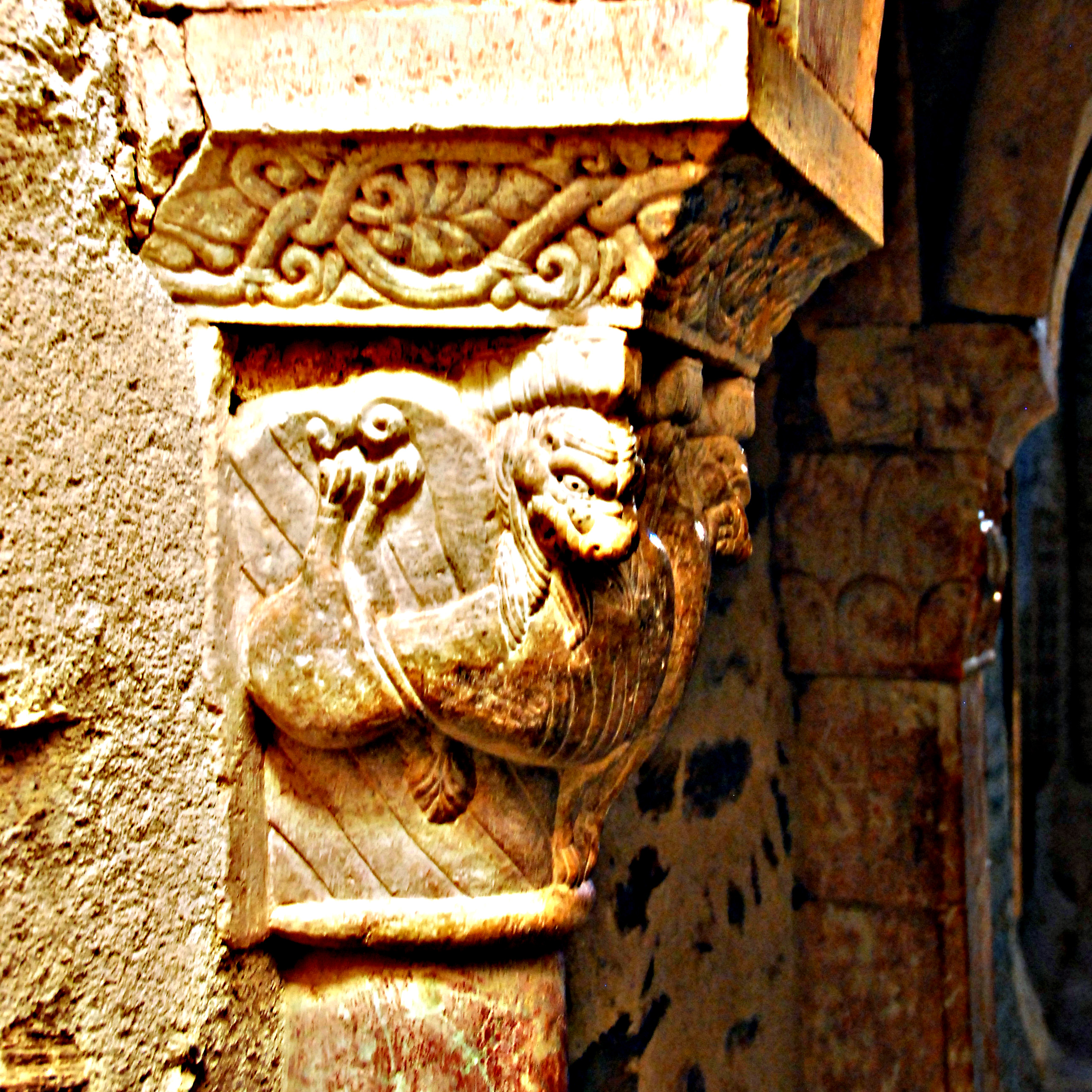 Serrabone, Empore, Kapitell Nr 13